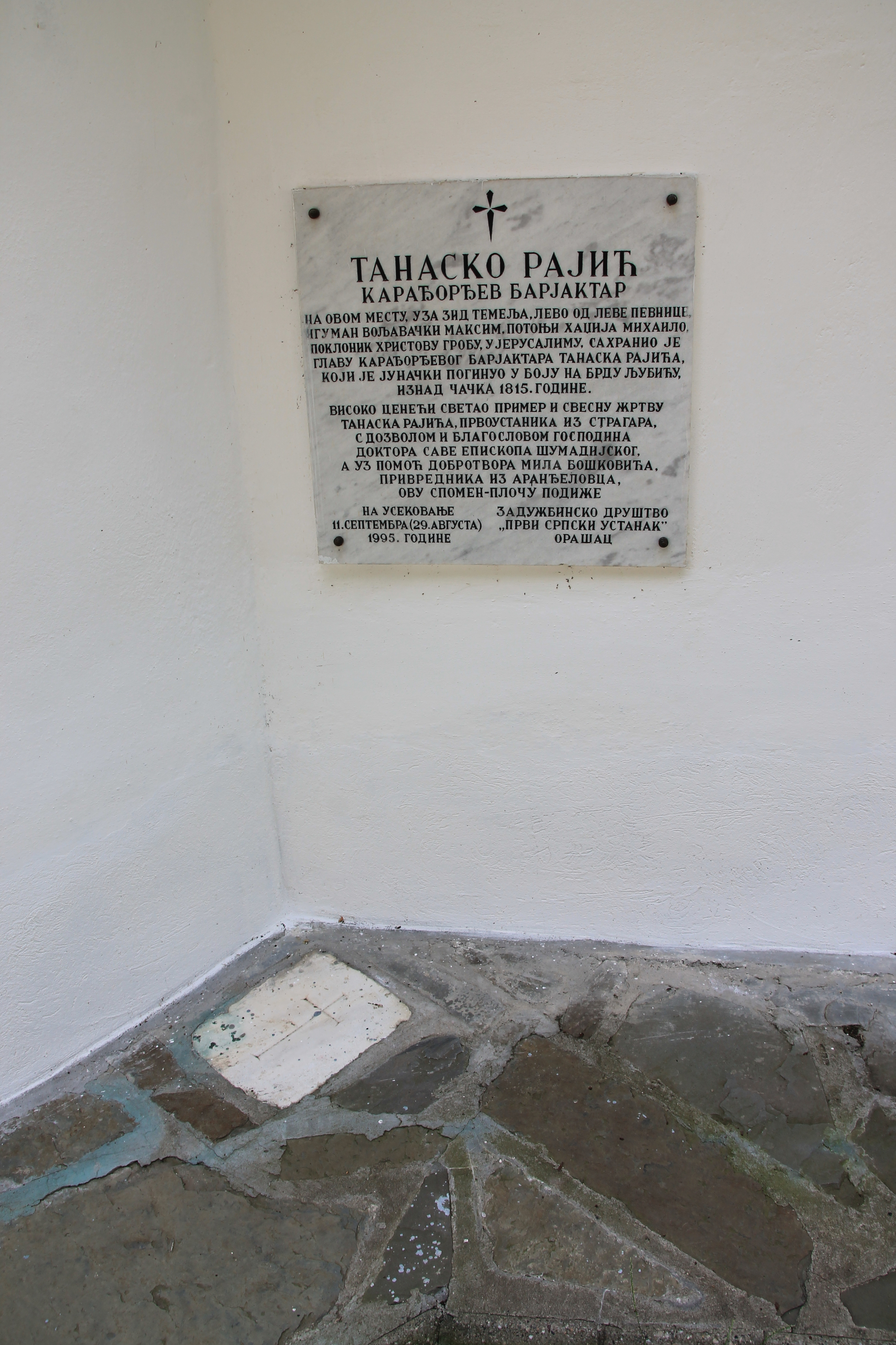 Manastir Voljavča